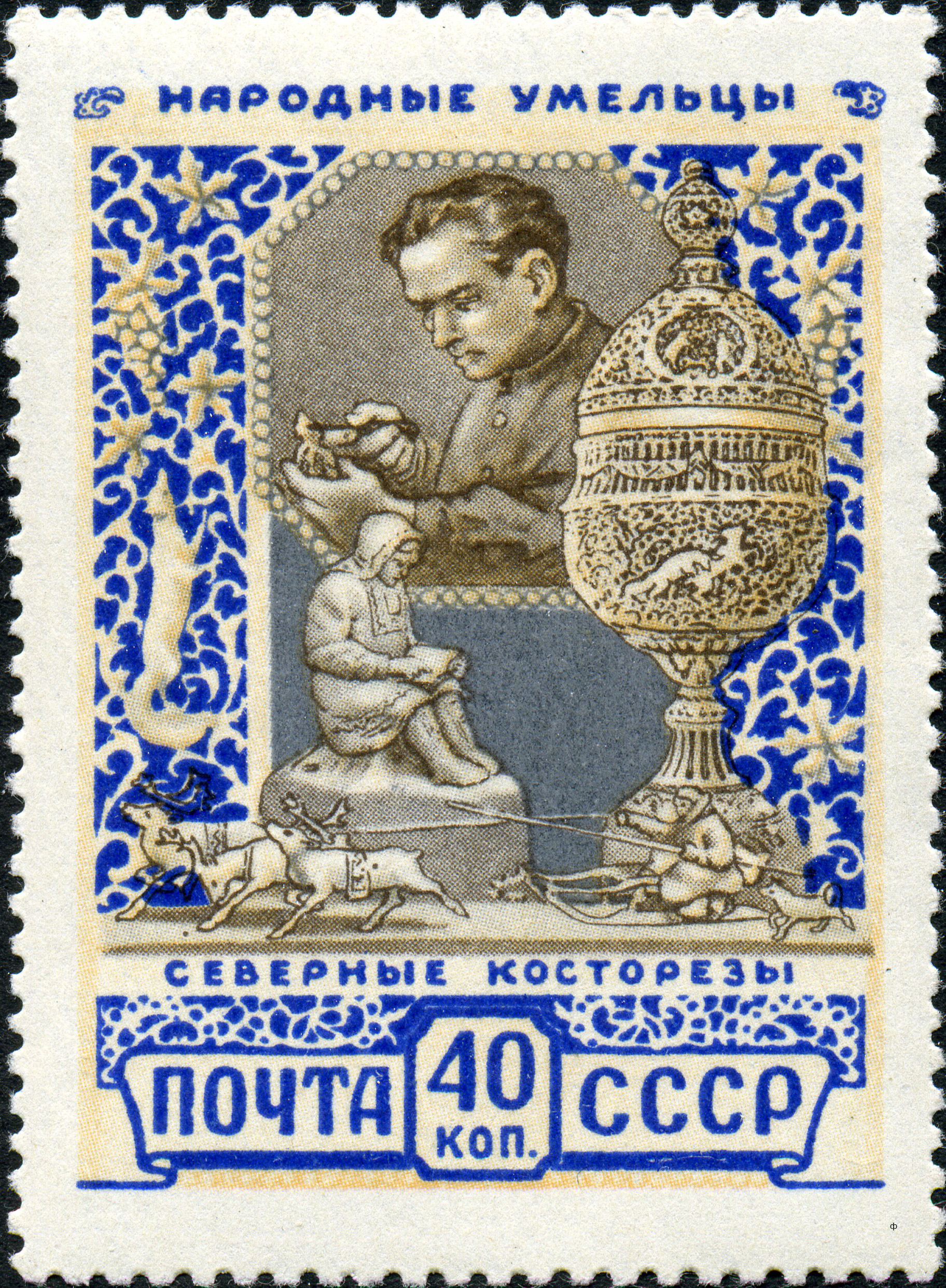 Марка СССР